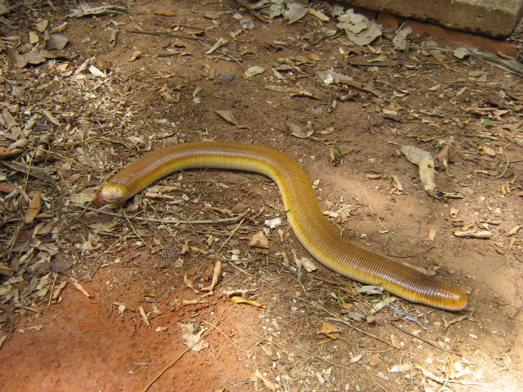 Amphisbaena alba